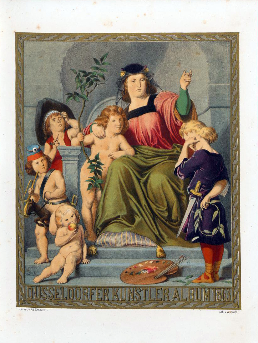 Düsseldorfer Künstler-Album, 13. Jg. 1863, Kupfertitel gemalt von Adolf Schmitz (monogr.), lithografiert von W. Krafft.